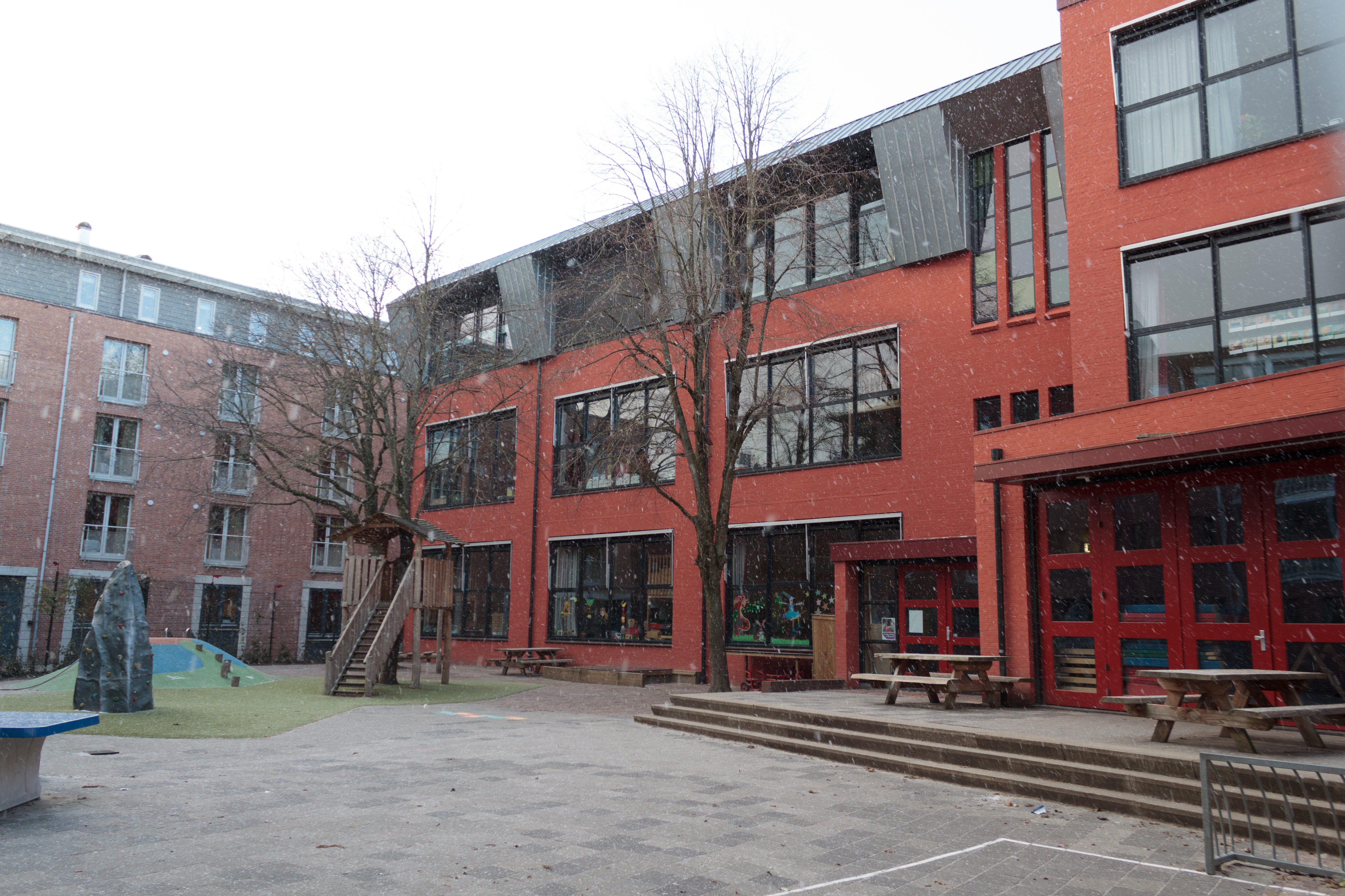 Schoolplein Sint-Michaelschool (Groningen)